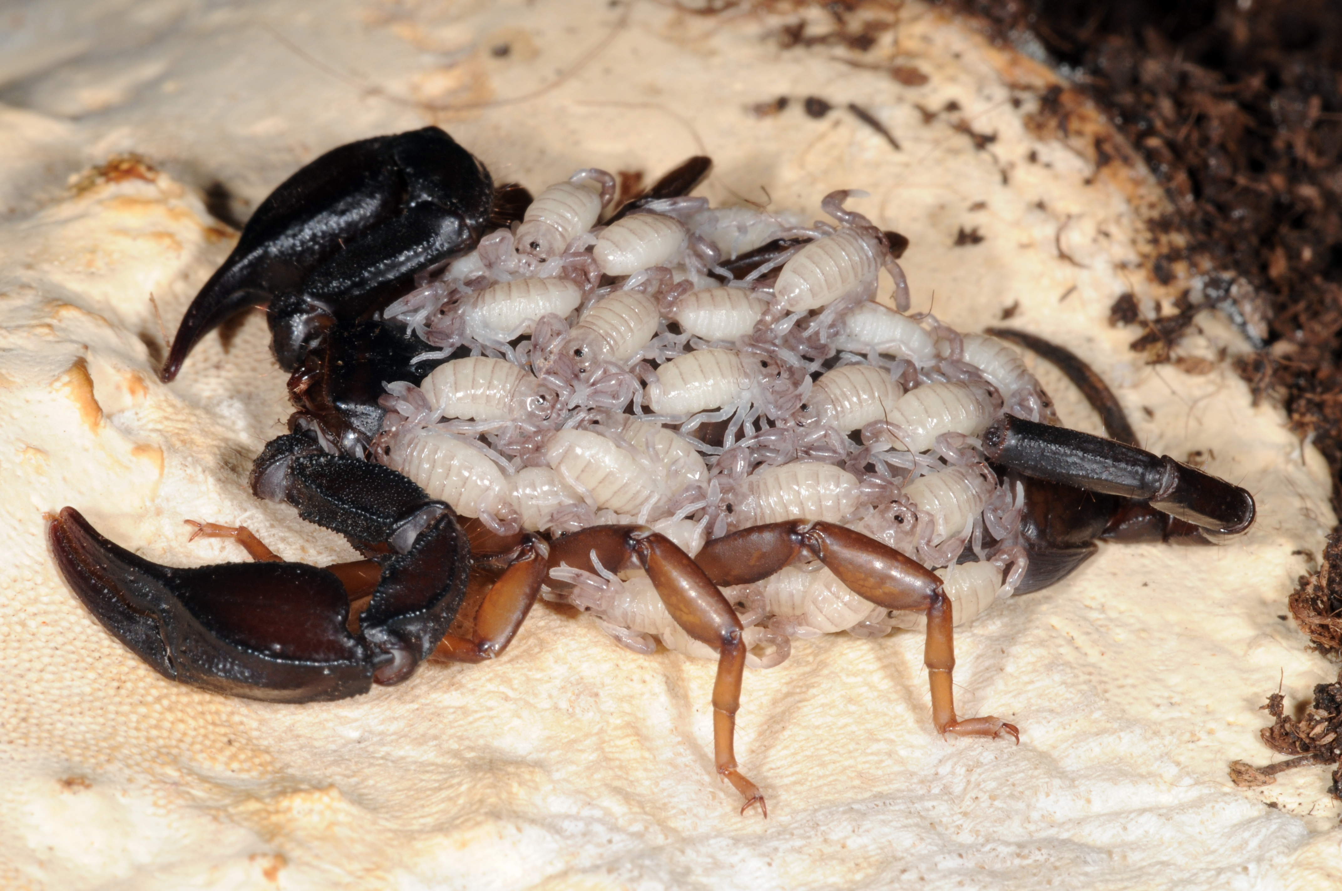 Euscorpius italicus, Weibchen mit Jungtieren, Gefangenschaft, ursprünglich aus dem Wallis, Schweiz